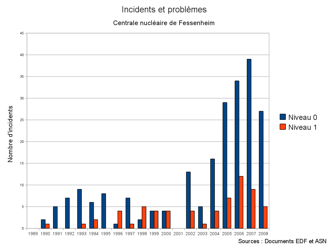 Graphique représentant le nombre d'incidents à Fessenheim. Les niveaux 0 et 1 correspondent à l'échelle internationale des évenements nucléaires (INES)